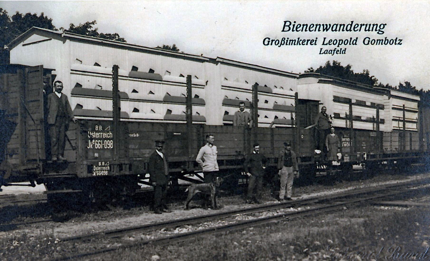 Bienenwanderung per Eisenbahn: Verladung und Transport der von dem österreichisch-ungarischen Imker Leopold Gombocz (1875–1943) entwickelten und angefertigten, speziellen Bienenwagen auf Güterwaggons der damaligen Österreichischen Staatsbahnen (ÖStB), hier im Jahr 1921 auf dem Bahnhof von Radkersburg in der Steiermark. (Hinweis: Für das Rollmaterial wurde damals der Unternehmensname Bundesbahnen Österreich verwendet, abgekürzt BBÖ oder wie hier B.B. Österreich.) Neben verschiedenen Bahnbediensteten und dem Bahnhofsvorstand (unten, mit Hund) sind auf dem Foto zu sehen: Leopold Gombocz (links, auf der Aufstiegstreppe zum Bremserhaus des linken Waggons; hinter ihm steht halb verdeckt ein Bahnbediensteter), sein Sohn Leopold (auf dem linken Waggon) und seine Ehefrau (auf der Aufstiegstreppe zum rechten Waggon; oberhalb von ihr steht ein unbekannter Helfer}.